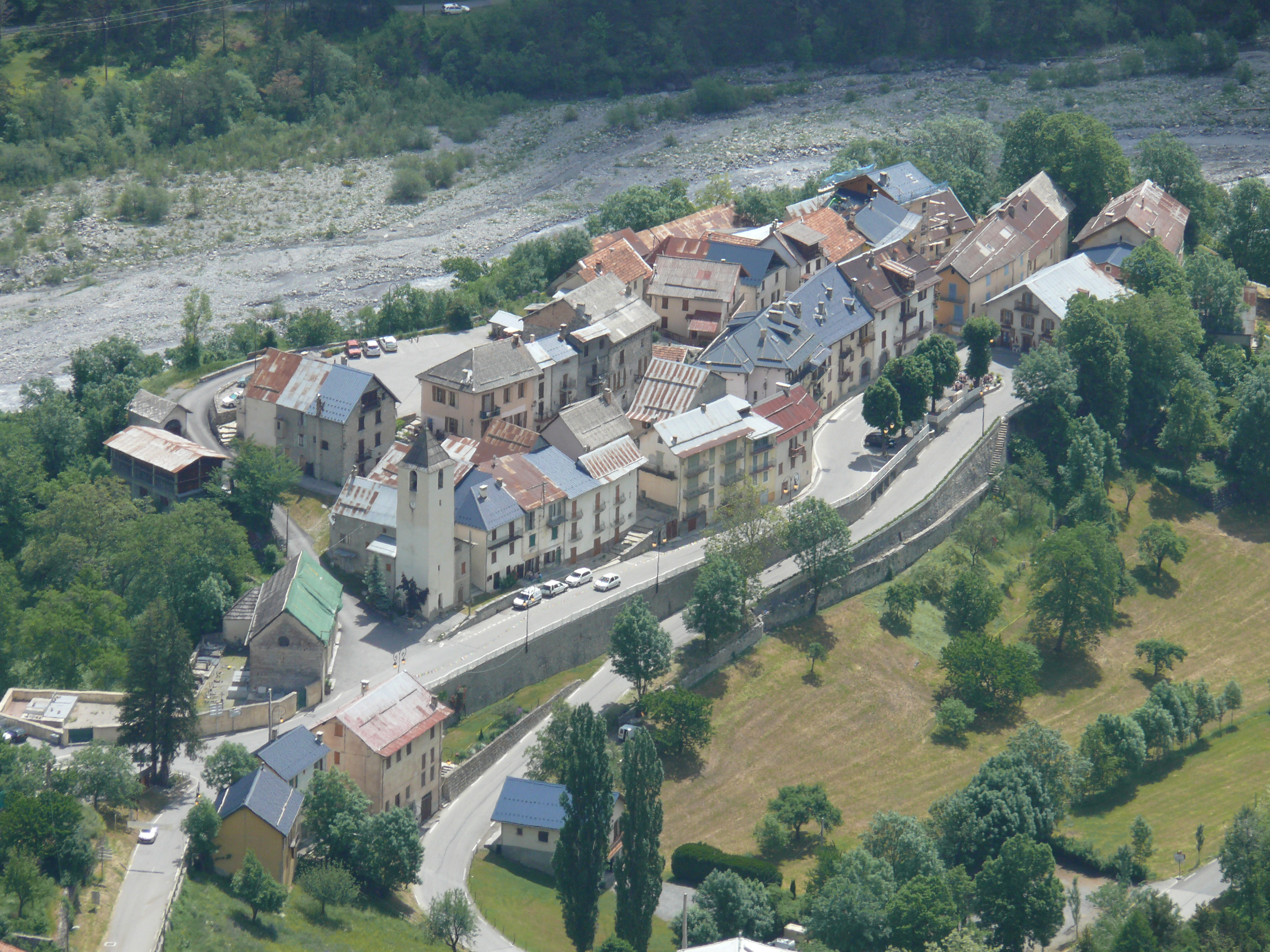 Saint-Martin-d'Entraunes - Vue du village à partir de la route du col des Champs